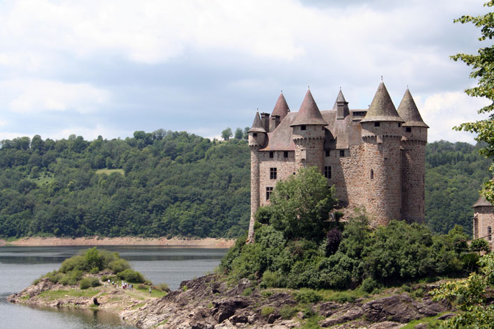 Le château de Val près du lac de Bort-les-Orgues